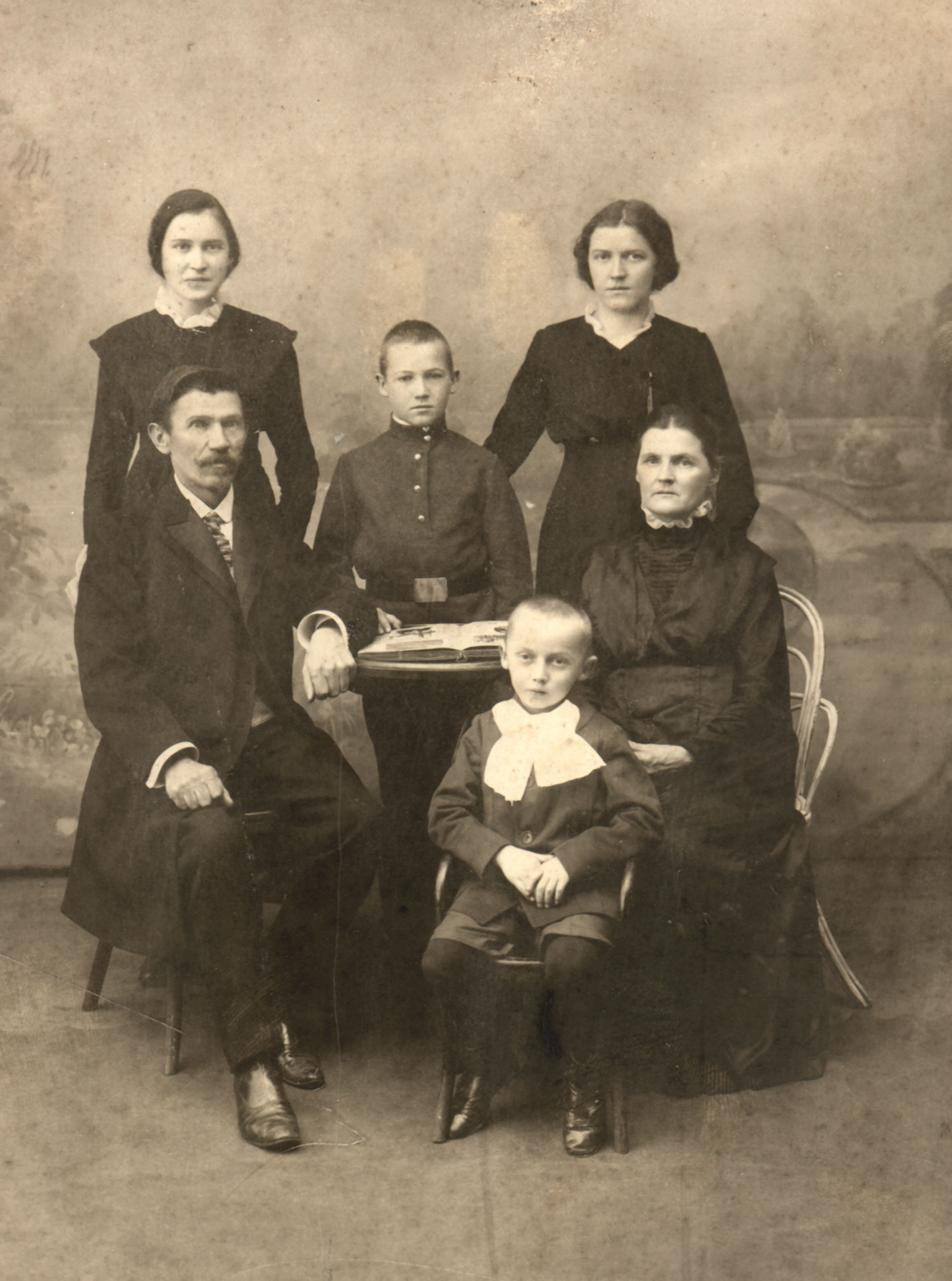 Семья Николая Александровича Рассушина.